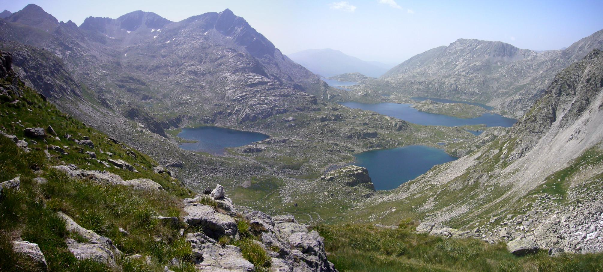 Vall Fosca vista des de la Collada dels Gavatxos; Espot, Pallars Sobirà, Catalunya